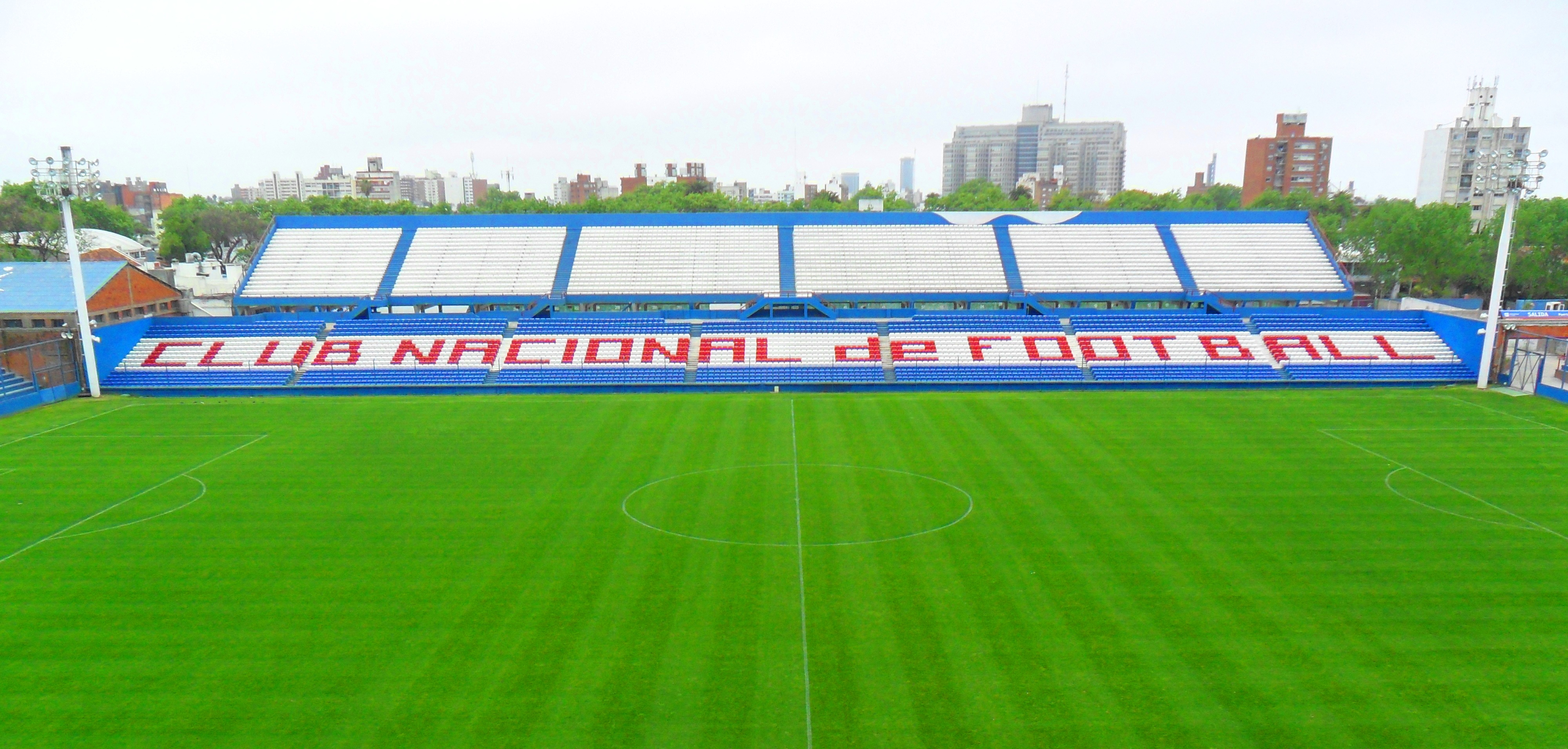 Imágen de la tribuna Atilio García